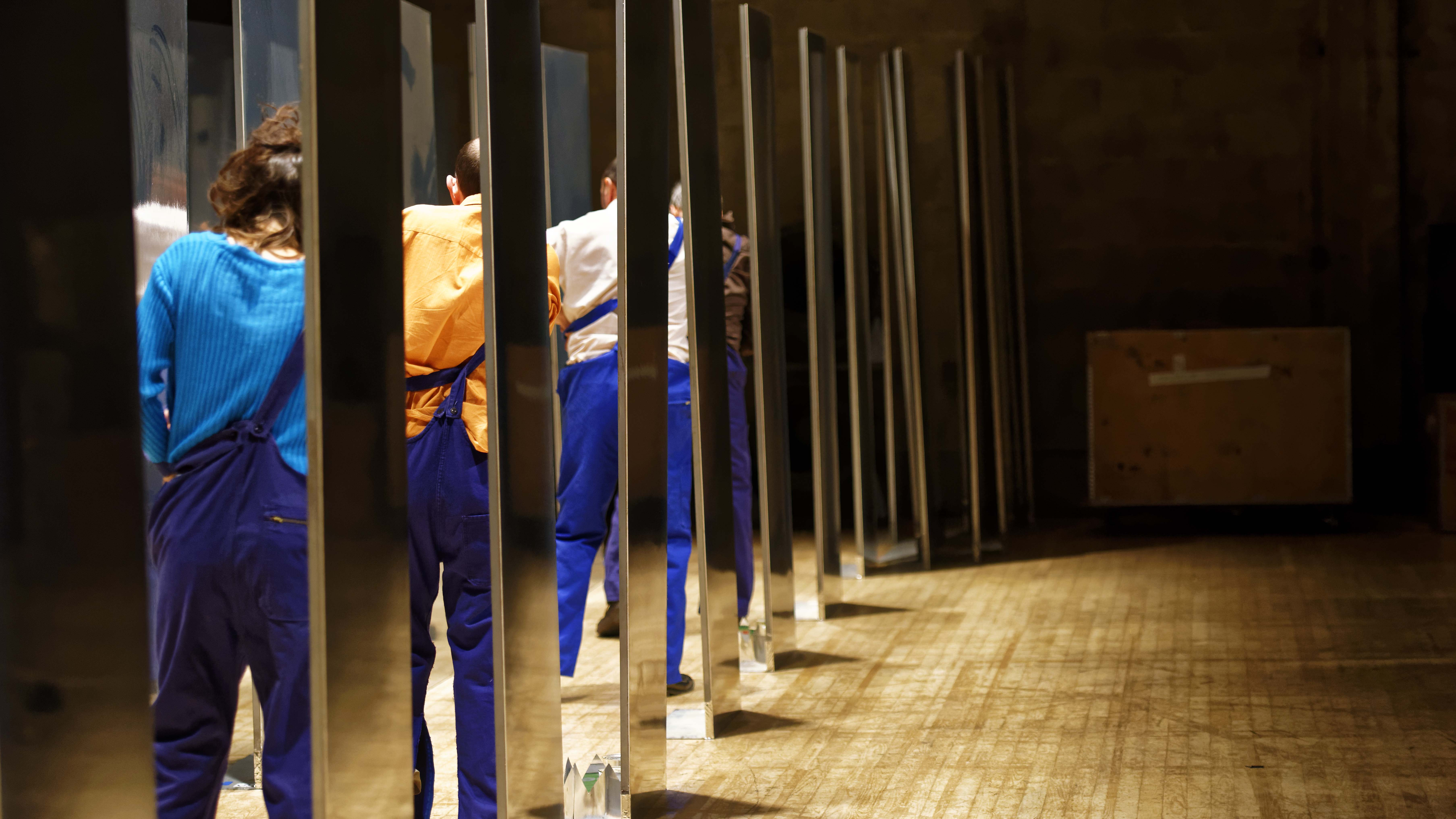 Umwelt - création Maguy Marin 2004